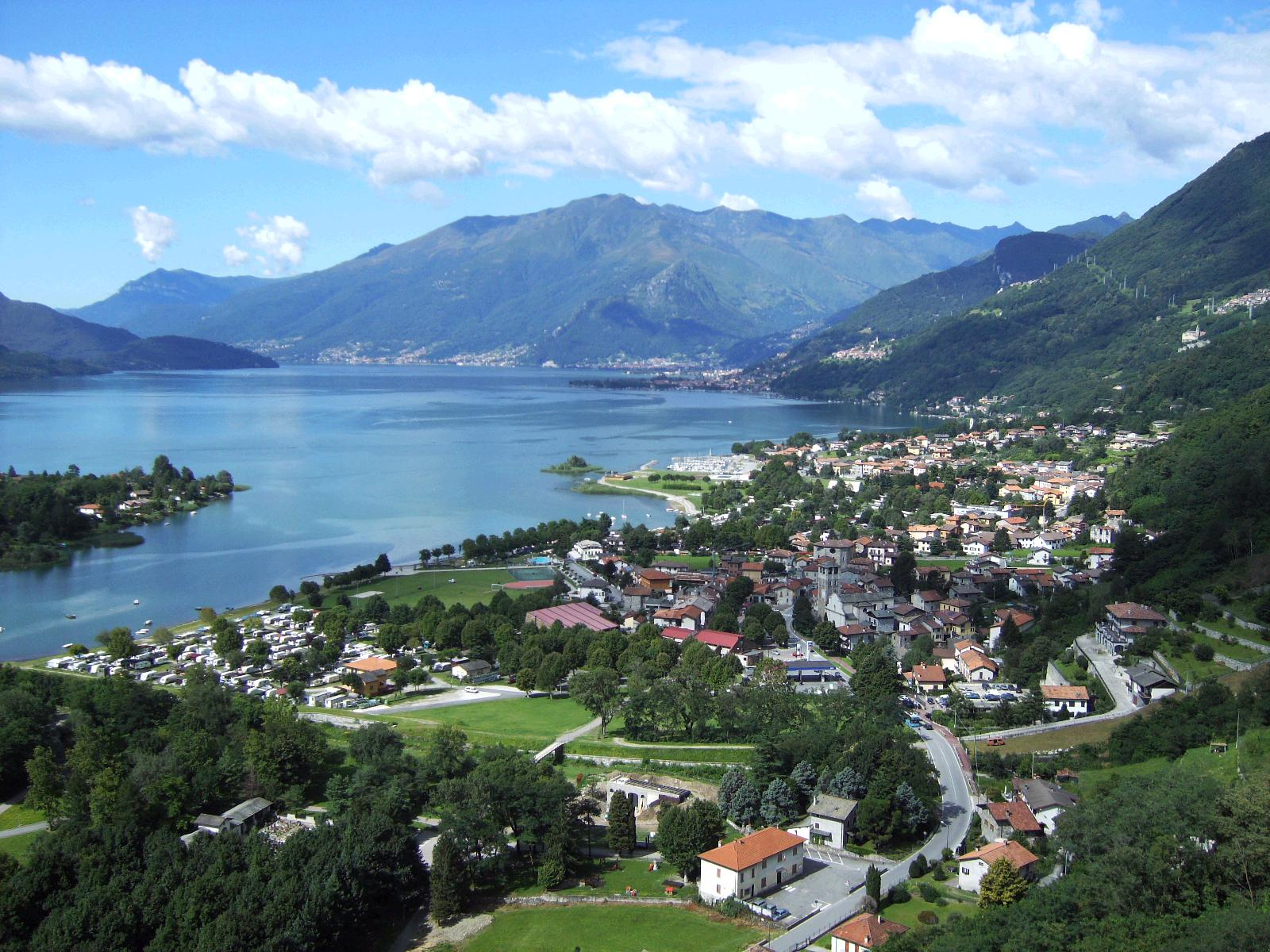 Sorico da san miro